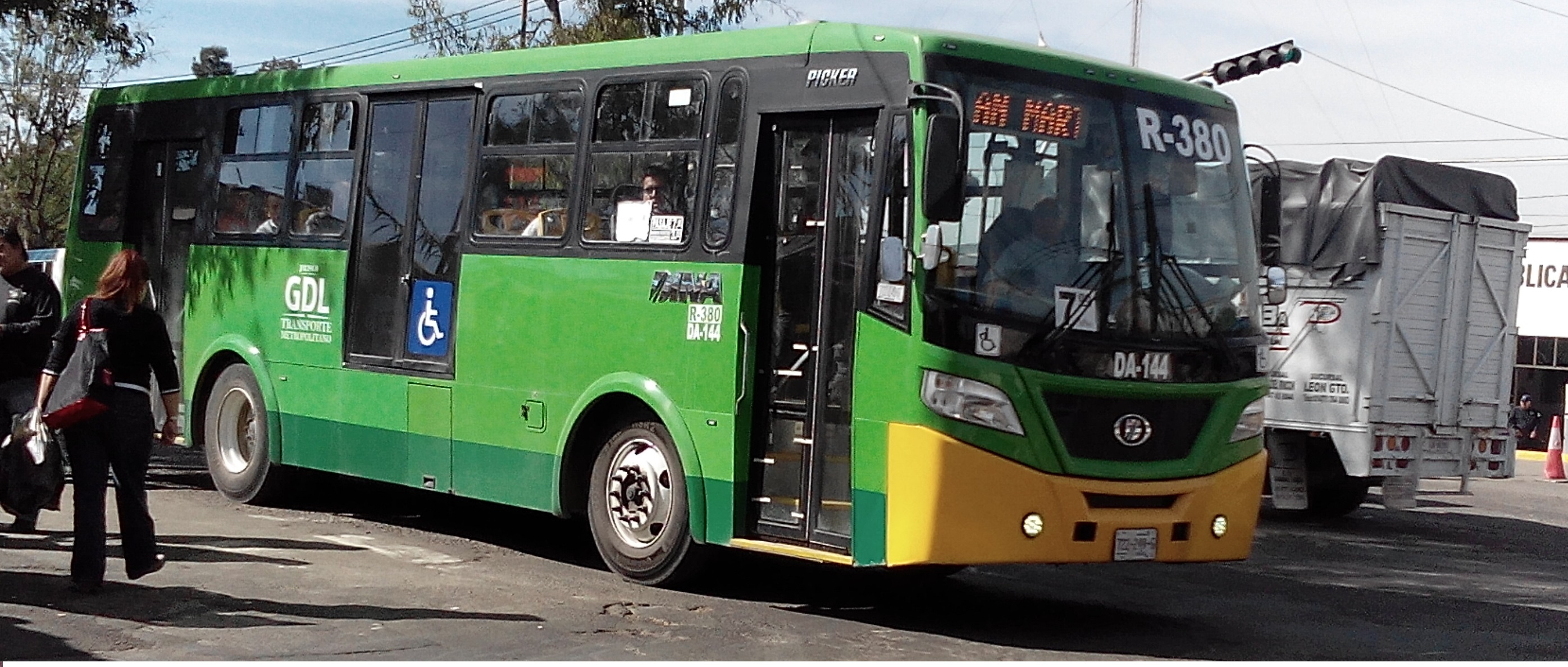 Autobús urbano de Guadalajara, México.